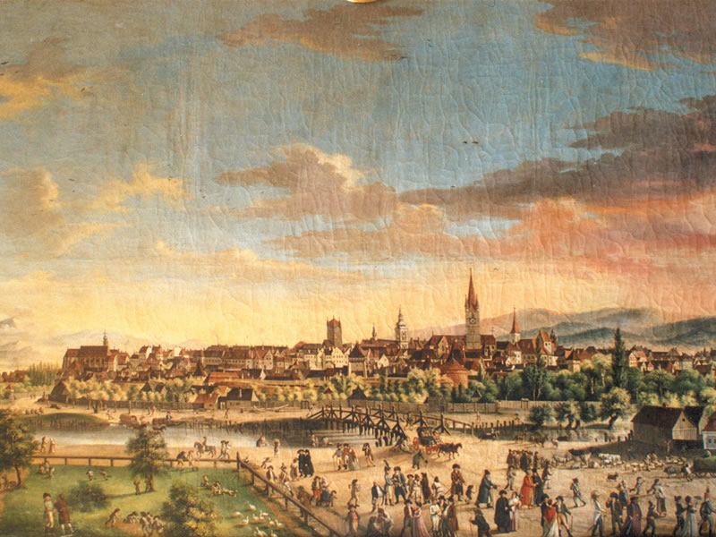 Sibiu la 1808 - fragment din pictura lui Frans Neuhauser